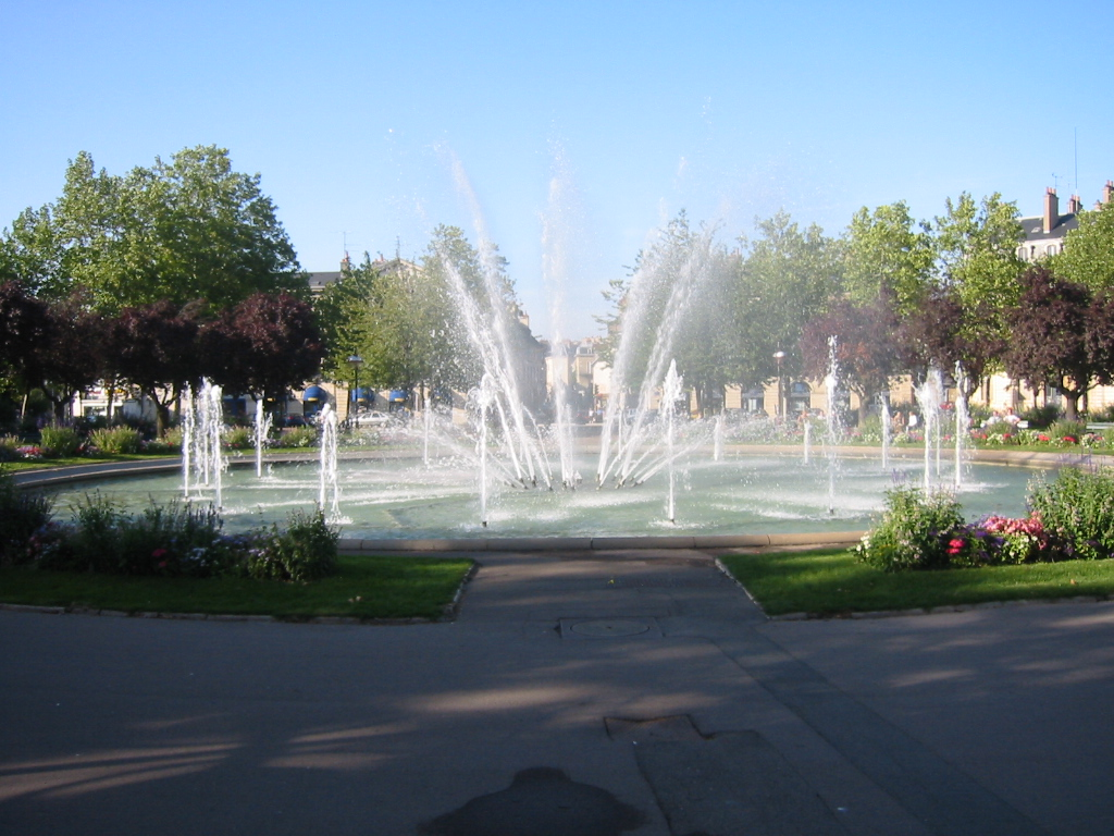 Jeux d'eau Place Wilson, Dijon, Bourgogne, France.